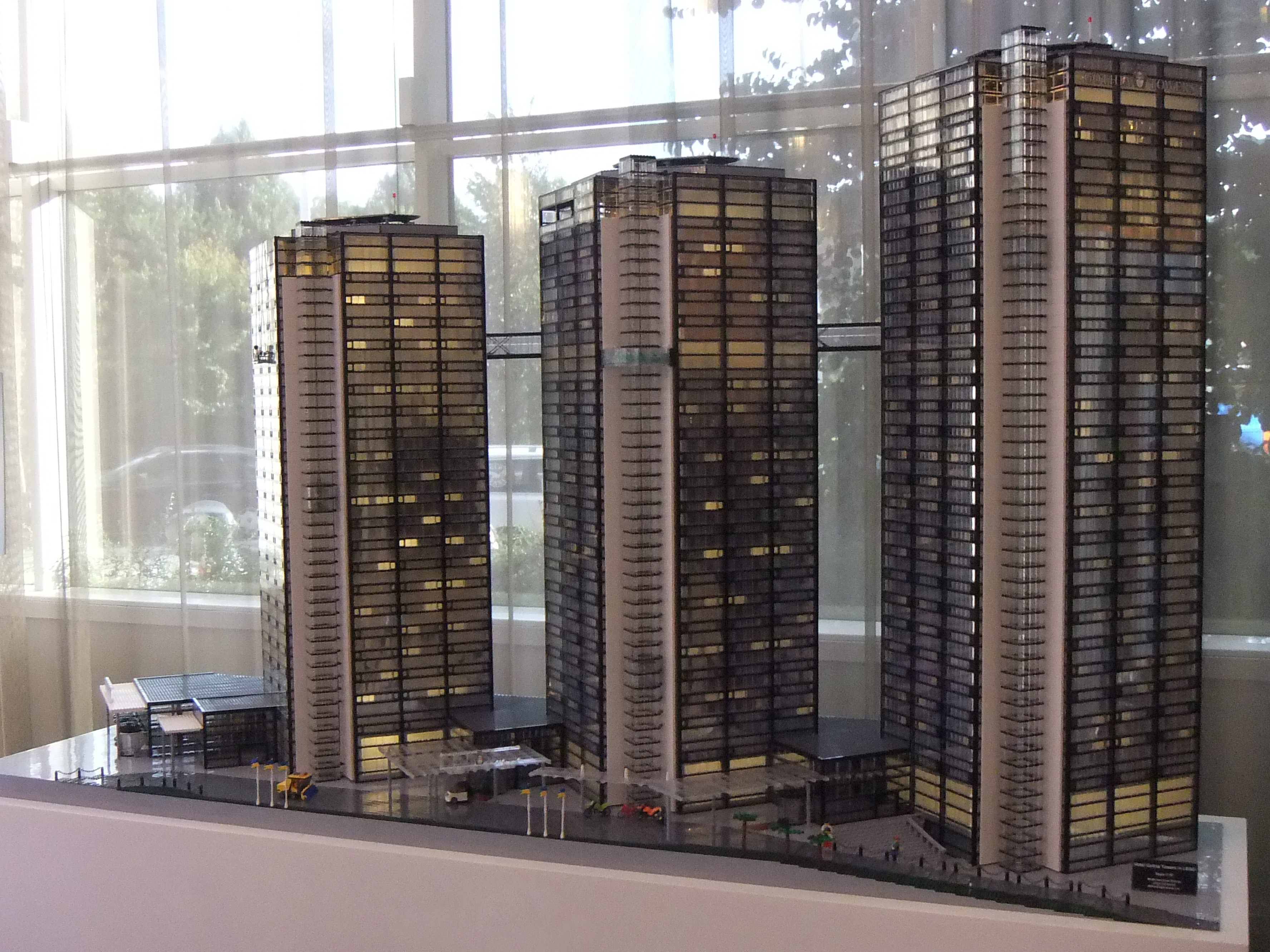 En Legomodell av Gothia Towers. Modellen är byggd av Johan Sahlström, civilingengör på Volvo lastvagnar.